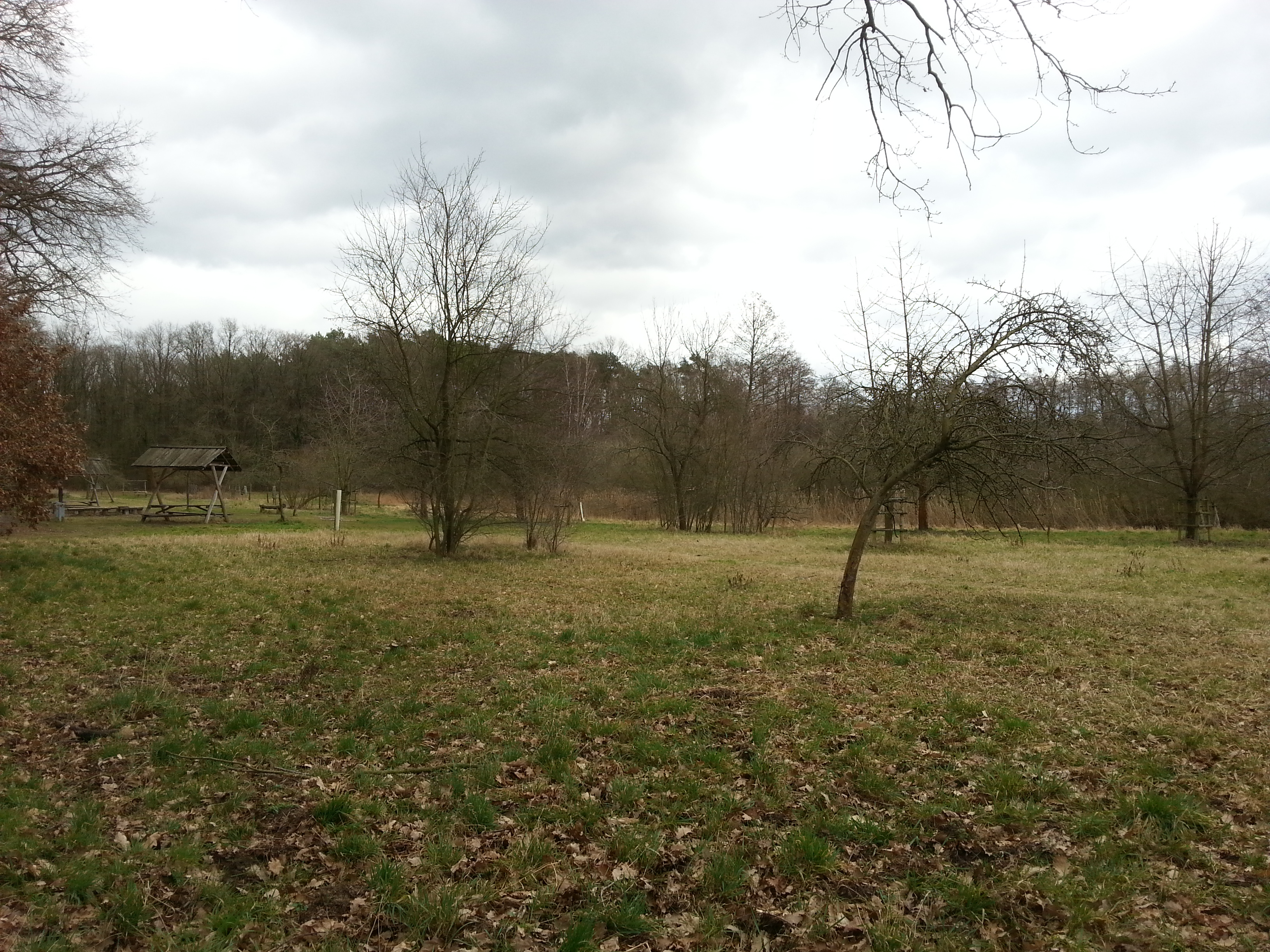 Streuobstwiese im Tiergarten von Königs Wusterhausen.